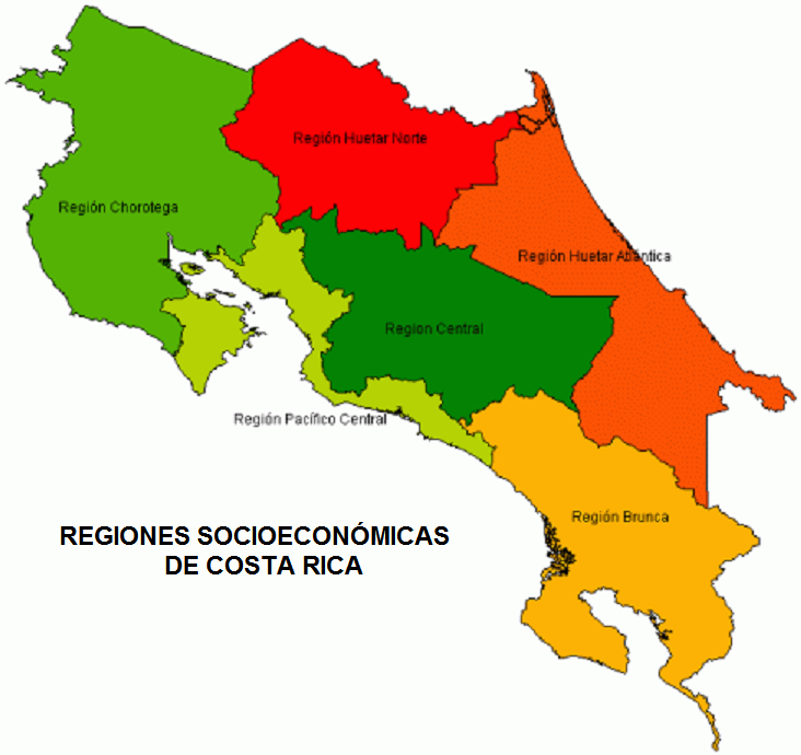 Regiones socioecnómicas de Costa Rica